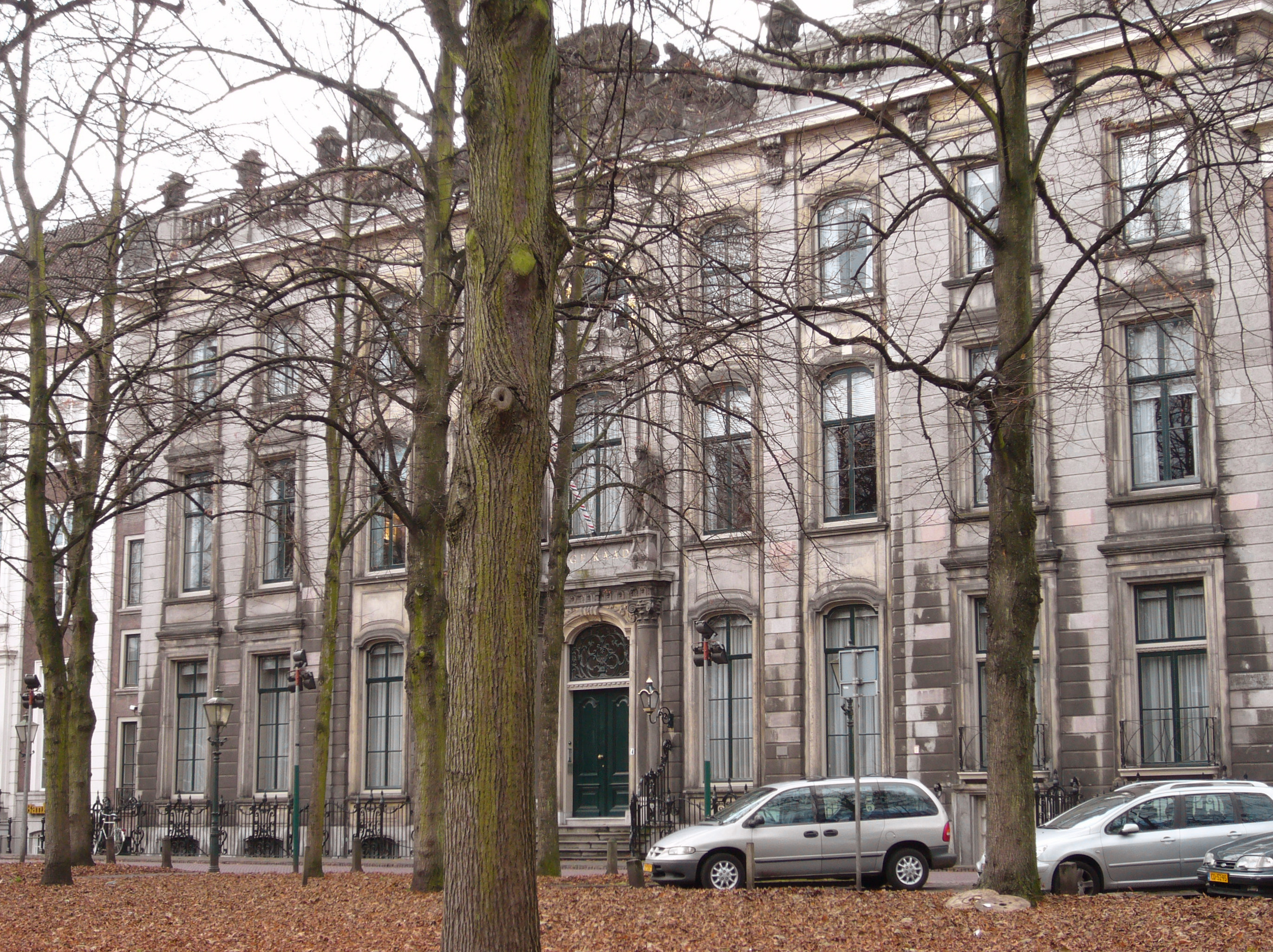 Den Haag, Huis Huguetan